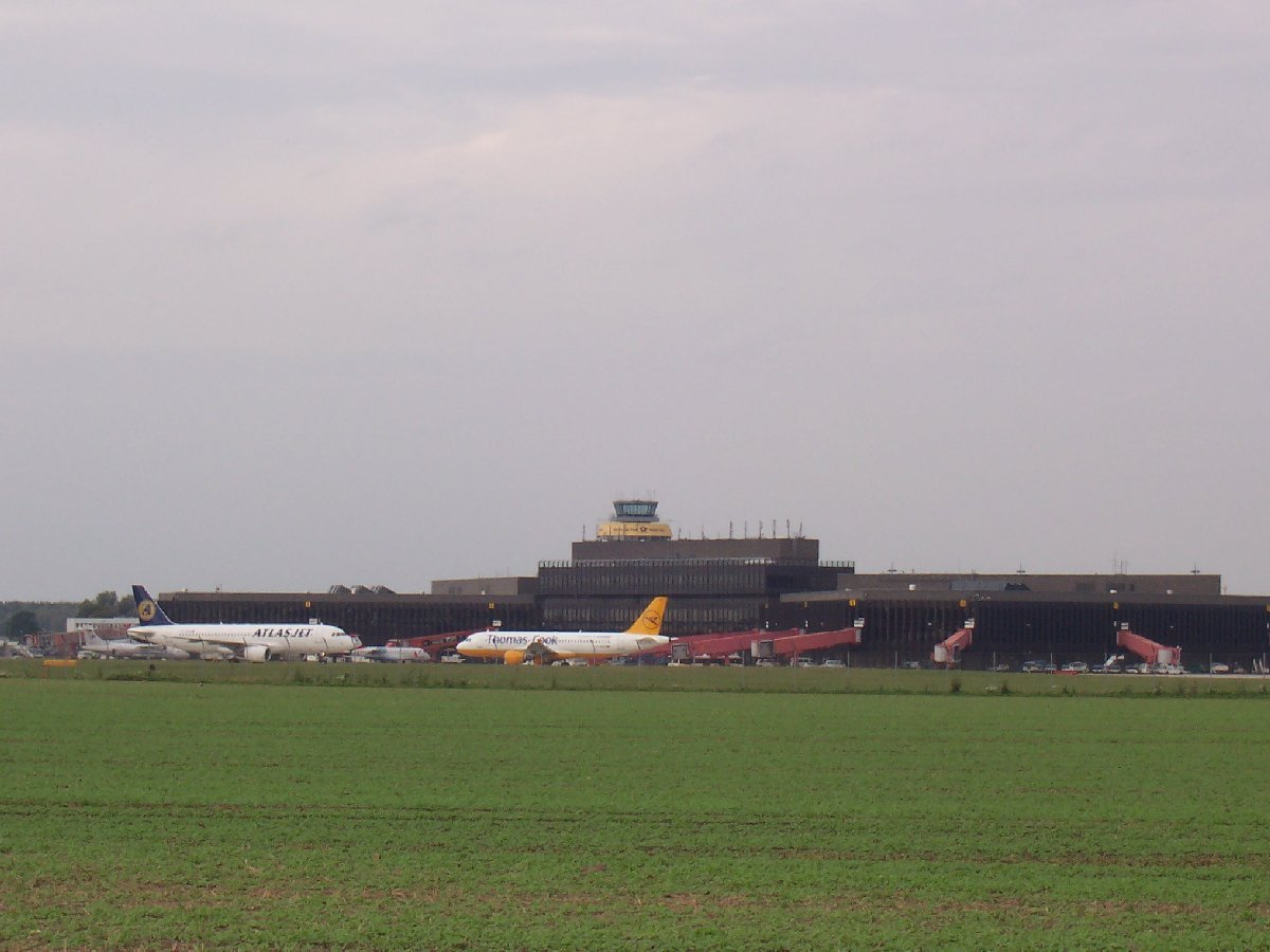 Terminals A und B des Flughafens Hannover-Langenhagen mit dem ehemaligen Kontrollturm, der nun von der Deutschen Post zu Werbezwecken verwendet wird.